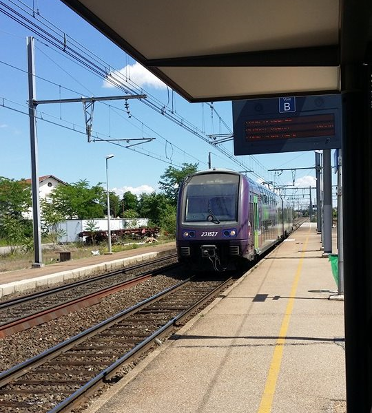 TER entre en Gare de Saint-Priest